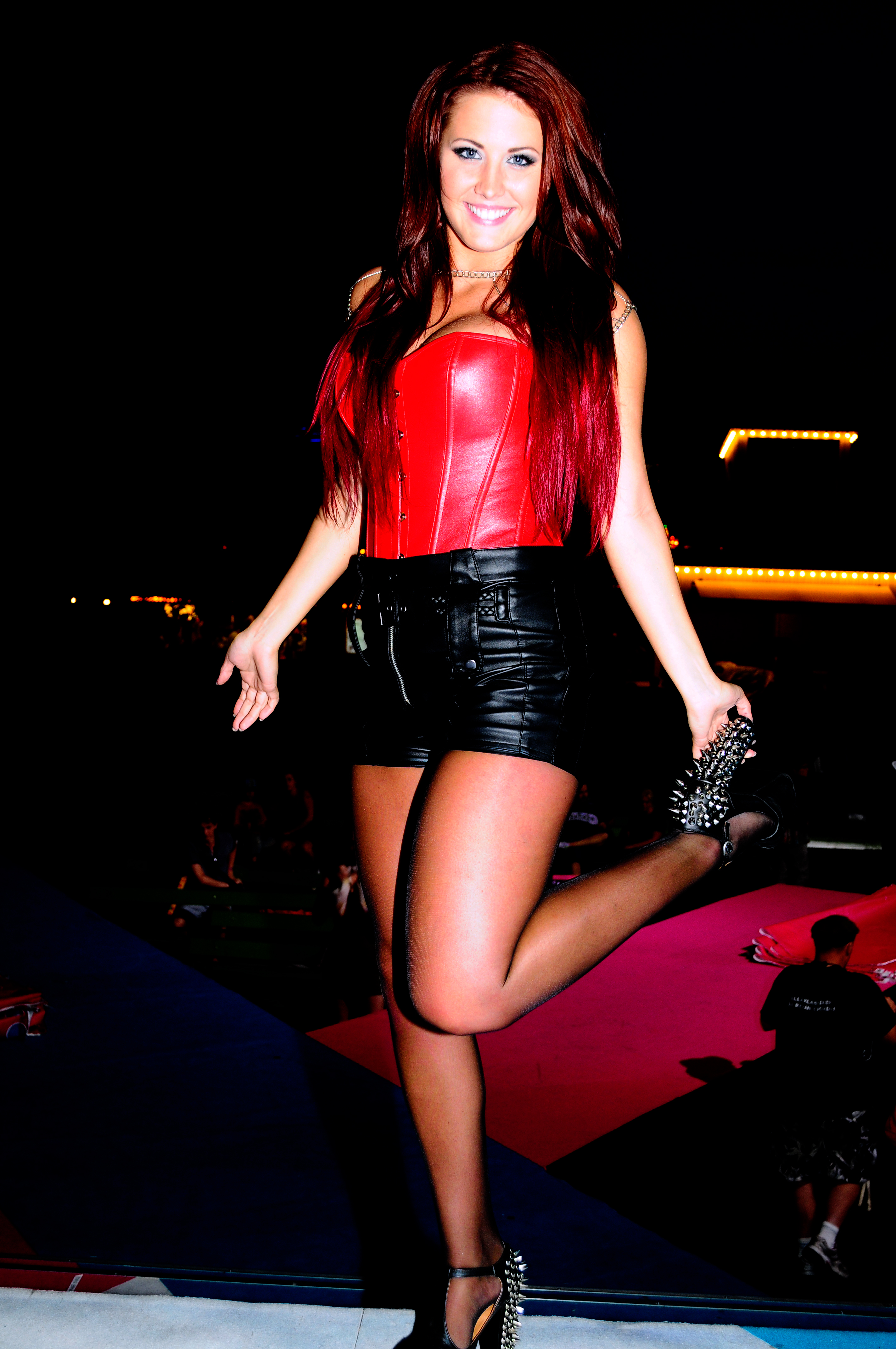 Molly Sandén besöker Sommarkrysset på nytt!